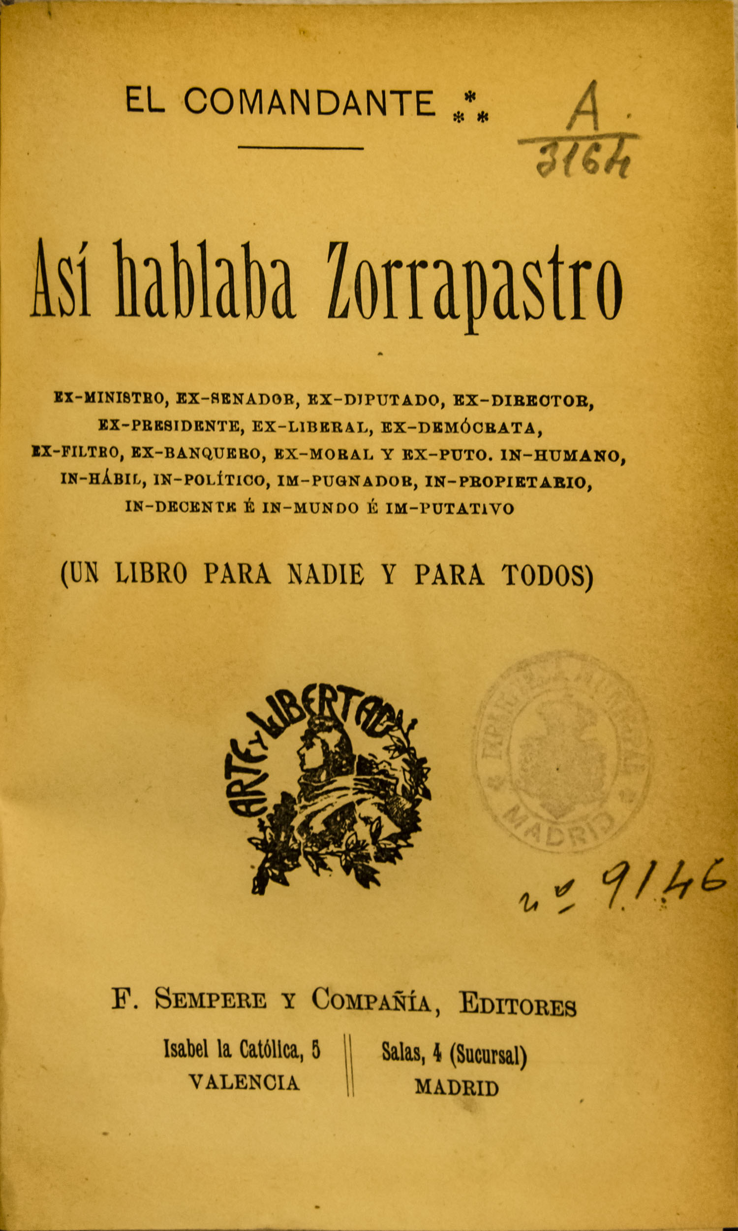 Portada de Así hablaba Zorrapastro.